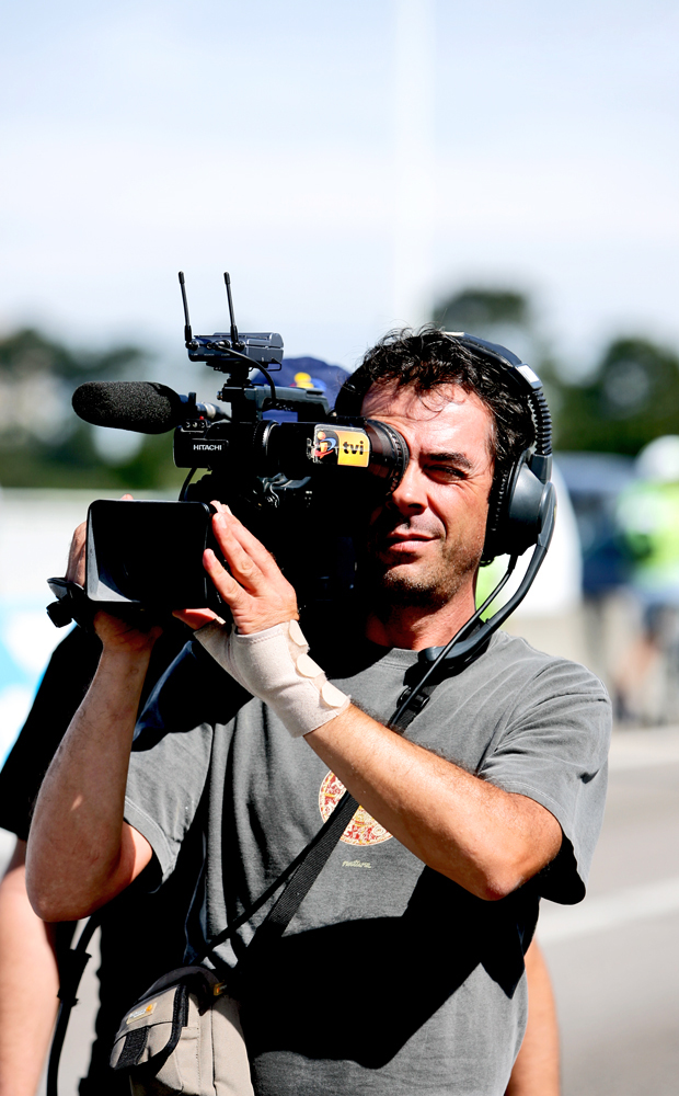 Porto Bike Tour